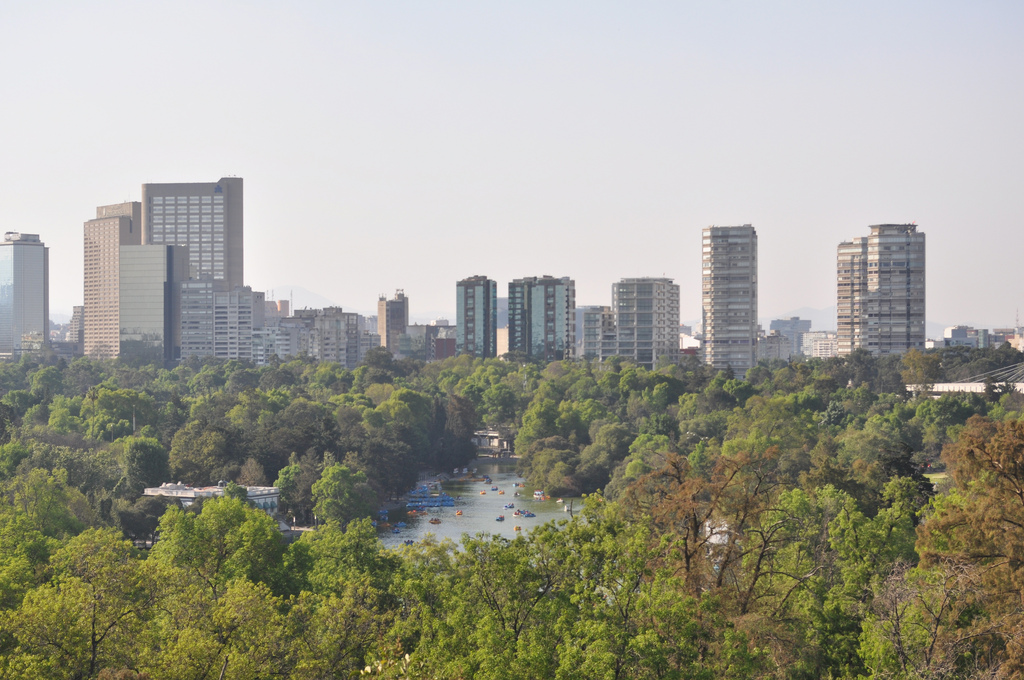 Lago de Chapultepec